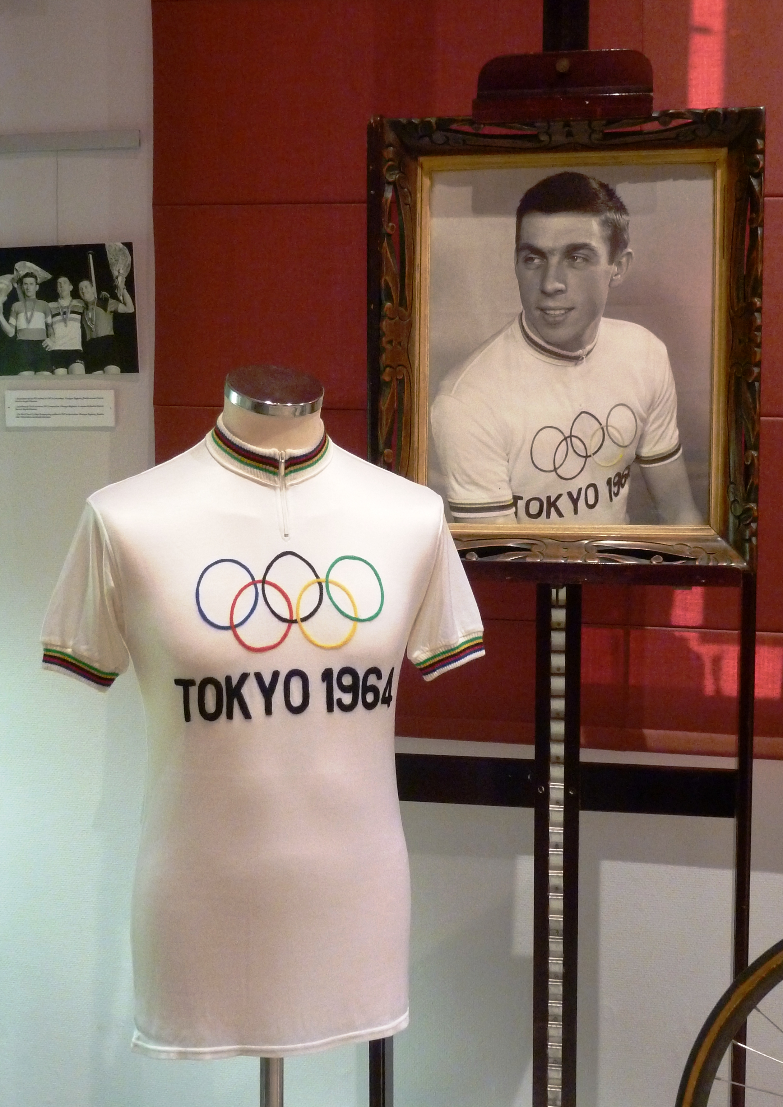 Trikot und Foto von Olympiasieger Patrick Sercu, Goldmedaille im 1000-Meter-Zeitfahren bei den Olympischen Spielen 1964 in Tokio, im National Wielermuseum in Roeselare, Belgien